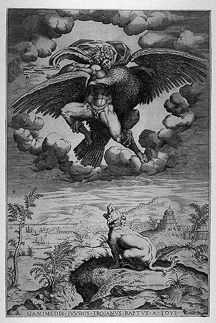 Nicolas Beatrizet (1515-1565), Ratto di Ganimede (incisione tratta dall'omonimo disegno di Michelangelo Buonarroti).